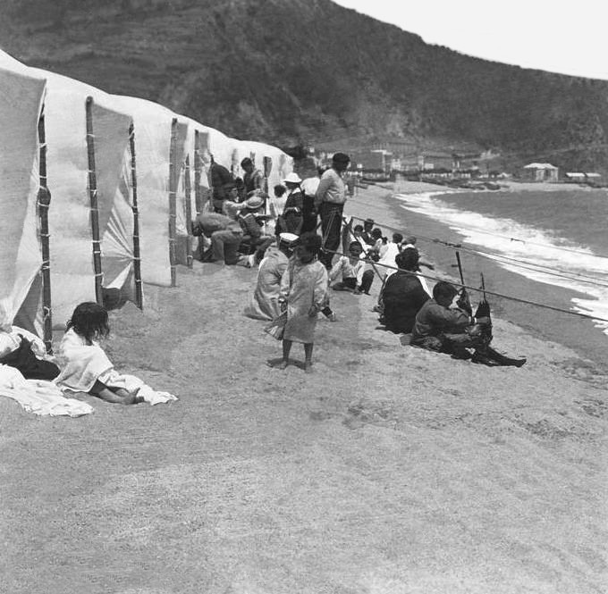 Banyistes a la sorra d'una platja de Blanes. Josep Salvany i Blanch (1916)